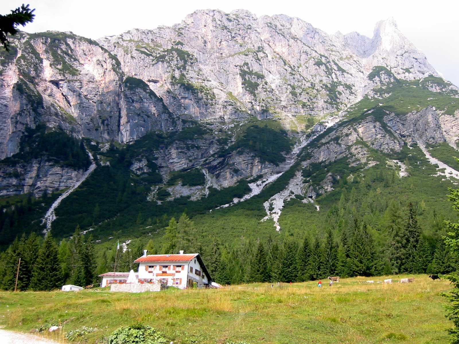 Rifugio Lunelli alla Selvapiana. Fotografiert im September 2004 von Fantasy :-)